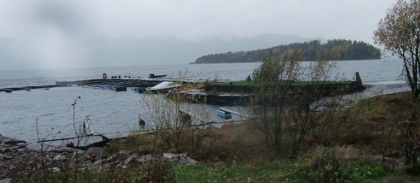 Brygga ved Utvika Camping